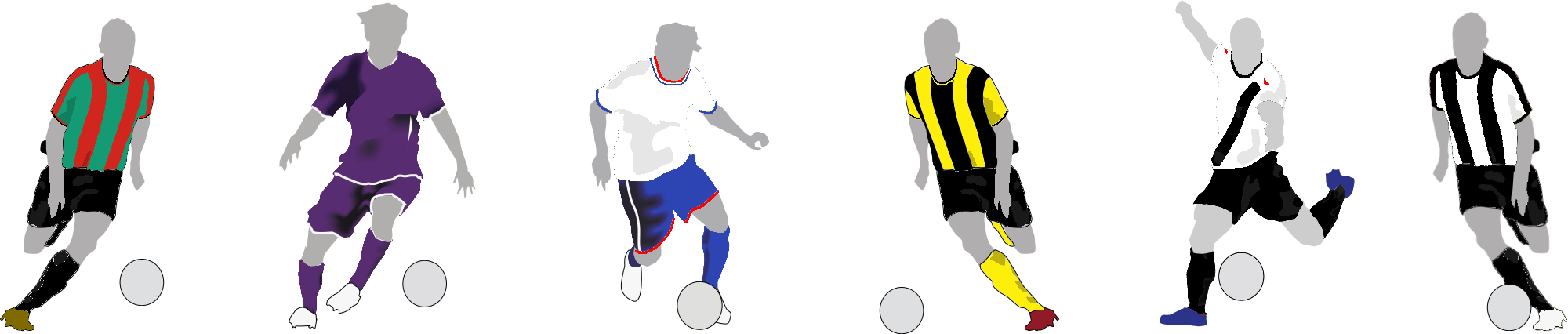 Dibujo de futbolistas de Nacional y Peñarol (considerados los "grandes" del fútbol uruguayo), y de Defensor Sporting, Danubio, Montevideo Wanderers y Rampla Juniors (considerados como "medianos"). De izquierda a derecha, jugador de Rampla Juniors, Defensor Sporting, Nacional, Peñarol, Danubio y Montevideo Wanderers.